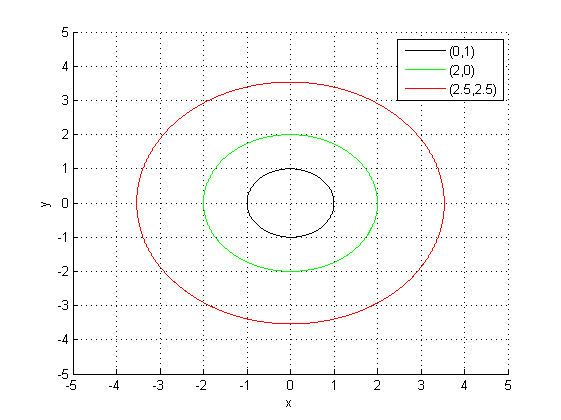 Trajektoria fazowa dla równania w artykule "Płaszczyzna fazowa"